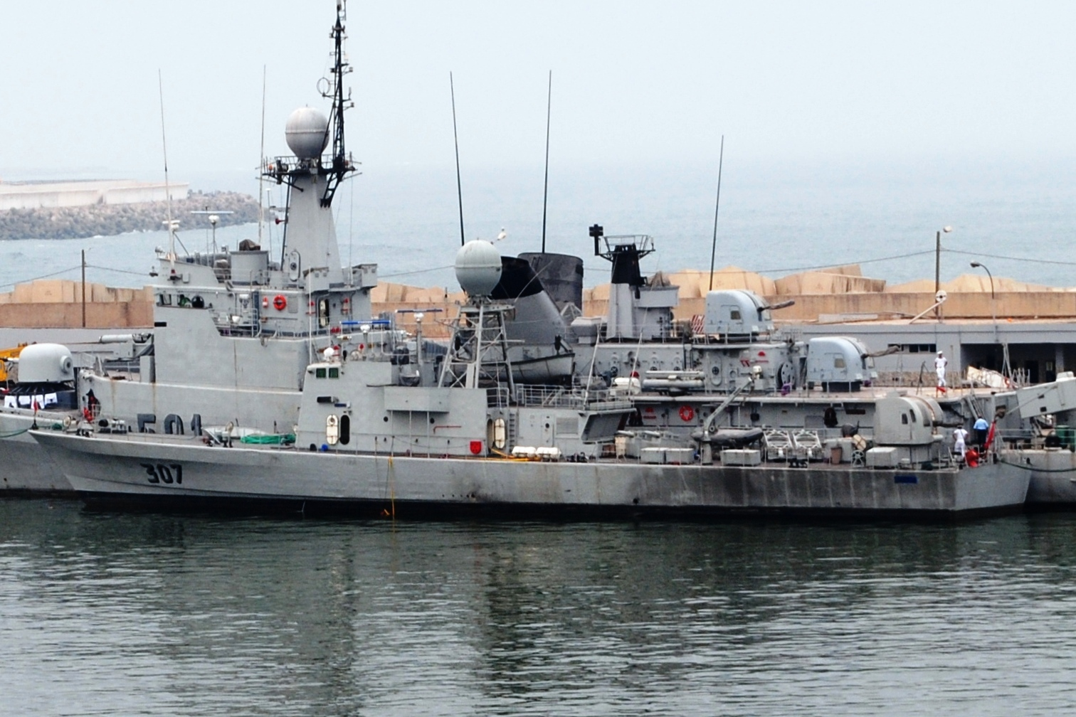 307 Commandant Azouggarh and (F-501) Lieutenant Colonel Errhamani, 2010